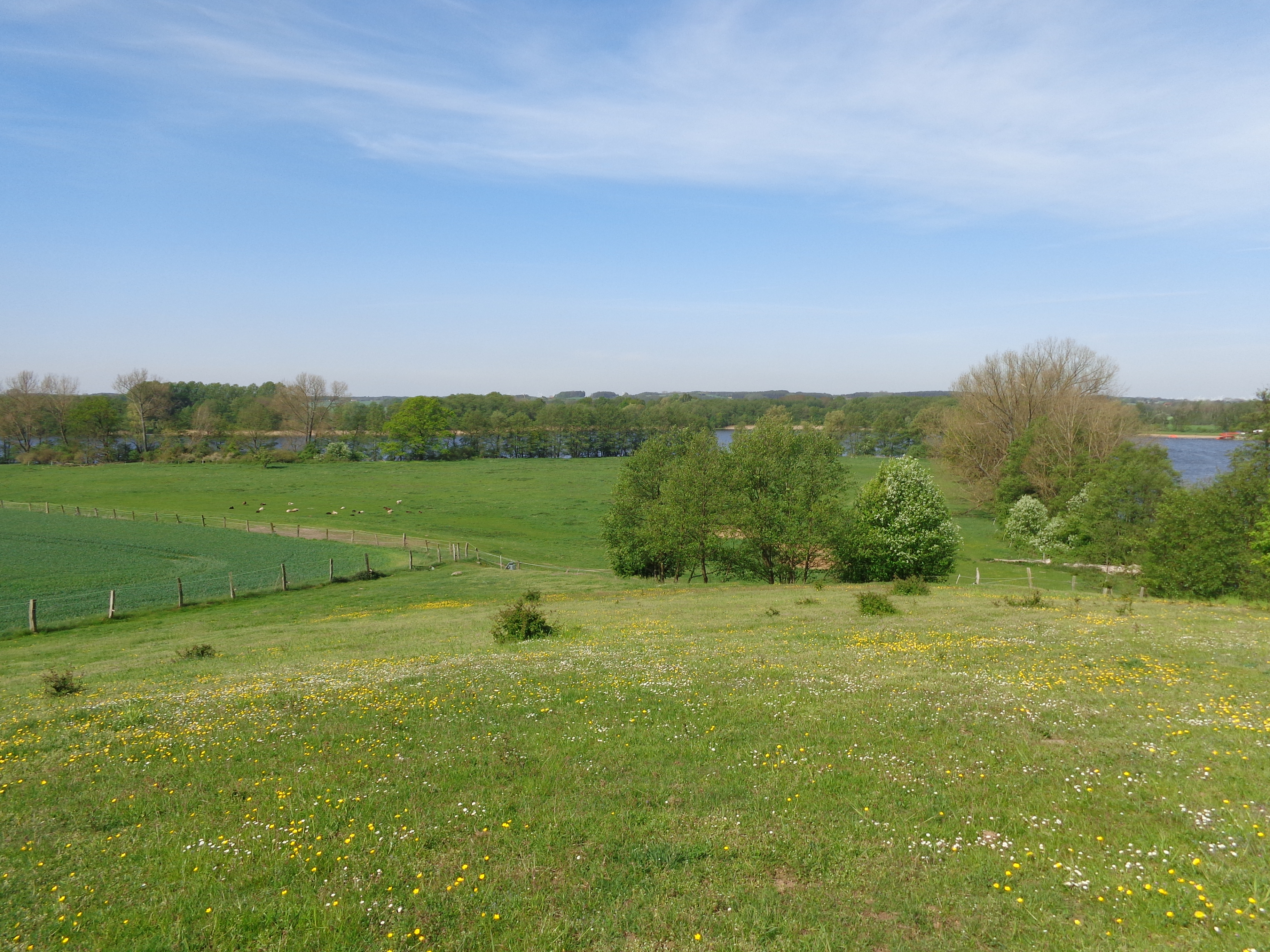 Kritzower See vom höchsten Punkt auf der Ostseite.